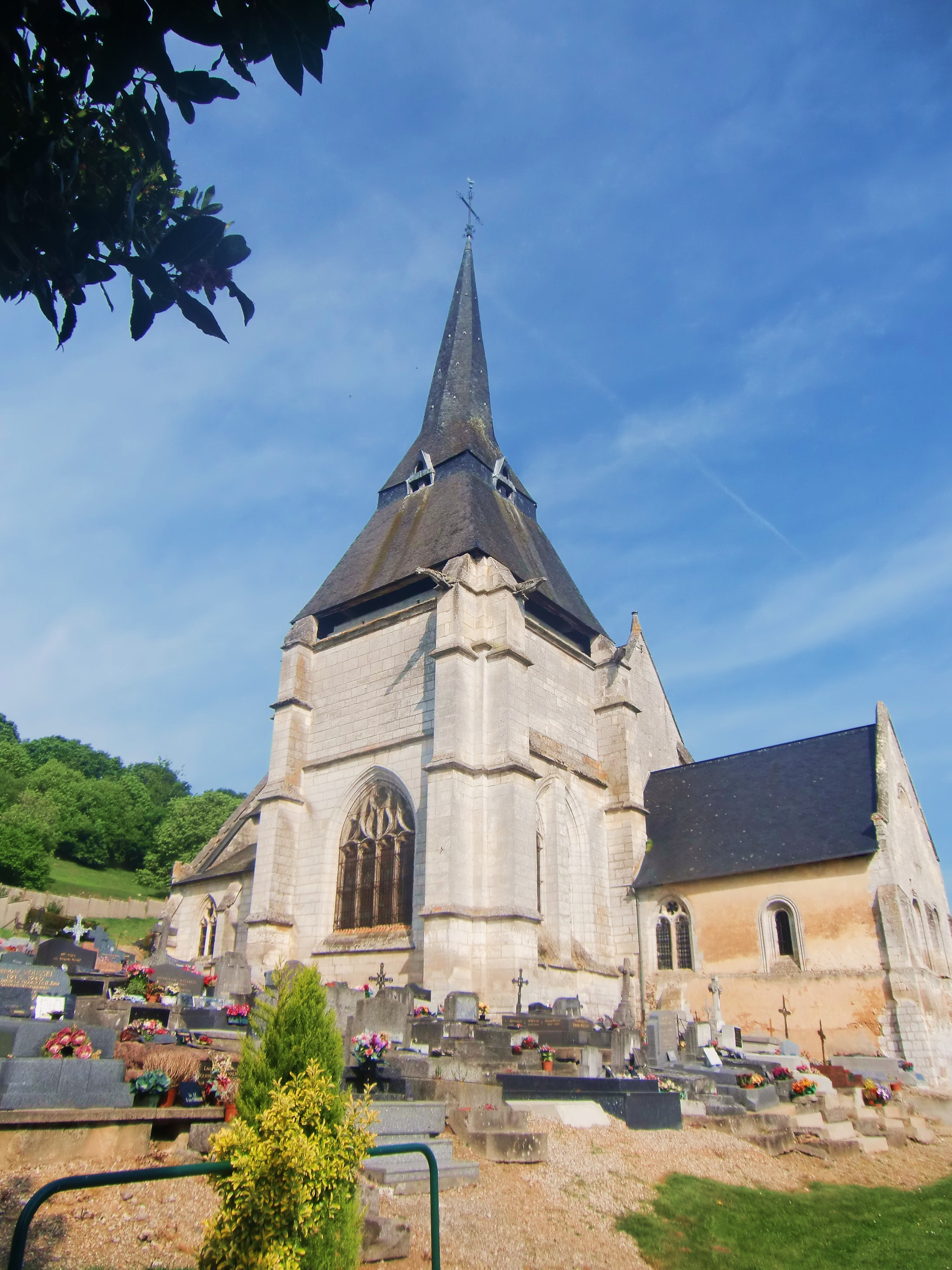 Église de Marais-Vernier (Eure, Normandie, France)